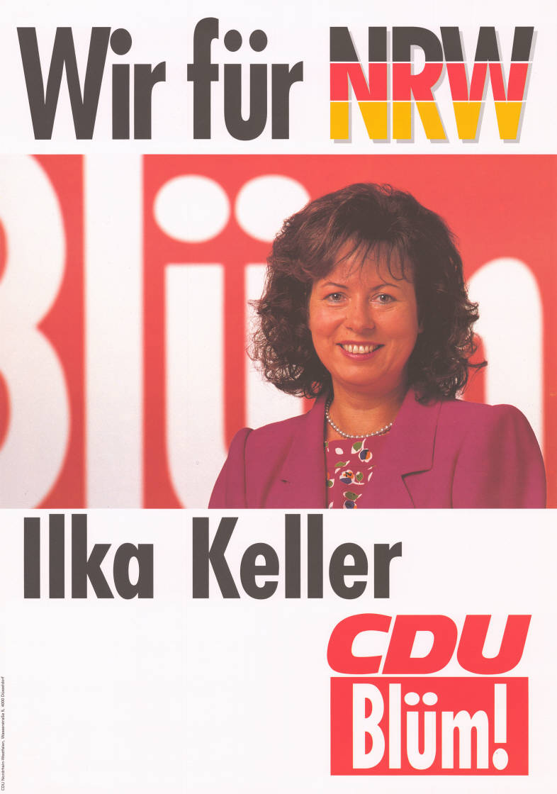 Wir für NRW Blüm! Ilka Keller CDU Blüm! Abbildung: Porträtfoto - Nationalfarben Plakatart: Kandidaten-/Personenplakat mit Porträt Auftraggeber: CDU Nordrhein-Westfalen, Düsseldorf Objekt-Signatur: 10-009 : 1121 Bestand: Landtagswahlplakate Nordrhein-Westfalen (10-009) GliederungBestand10-18: Landtagswahlplakate Nordrhein-Westfalen (10-009) » CDU Lizenz: KAS/ACDP 10-009 : 1121 CC-BY-SA 3.0 DE